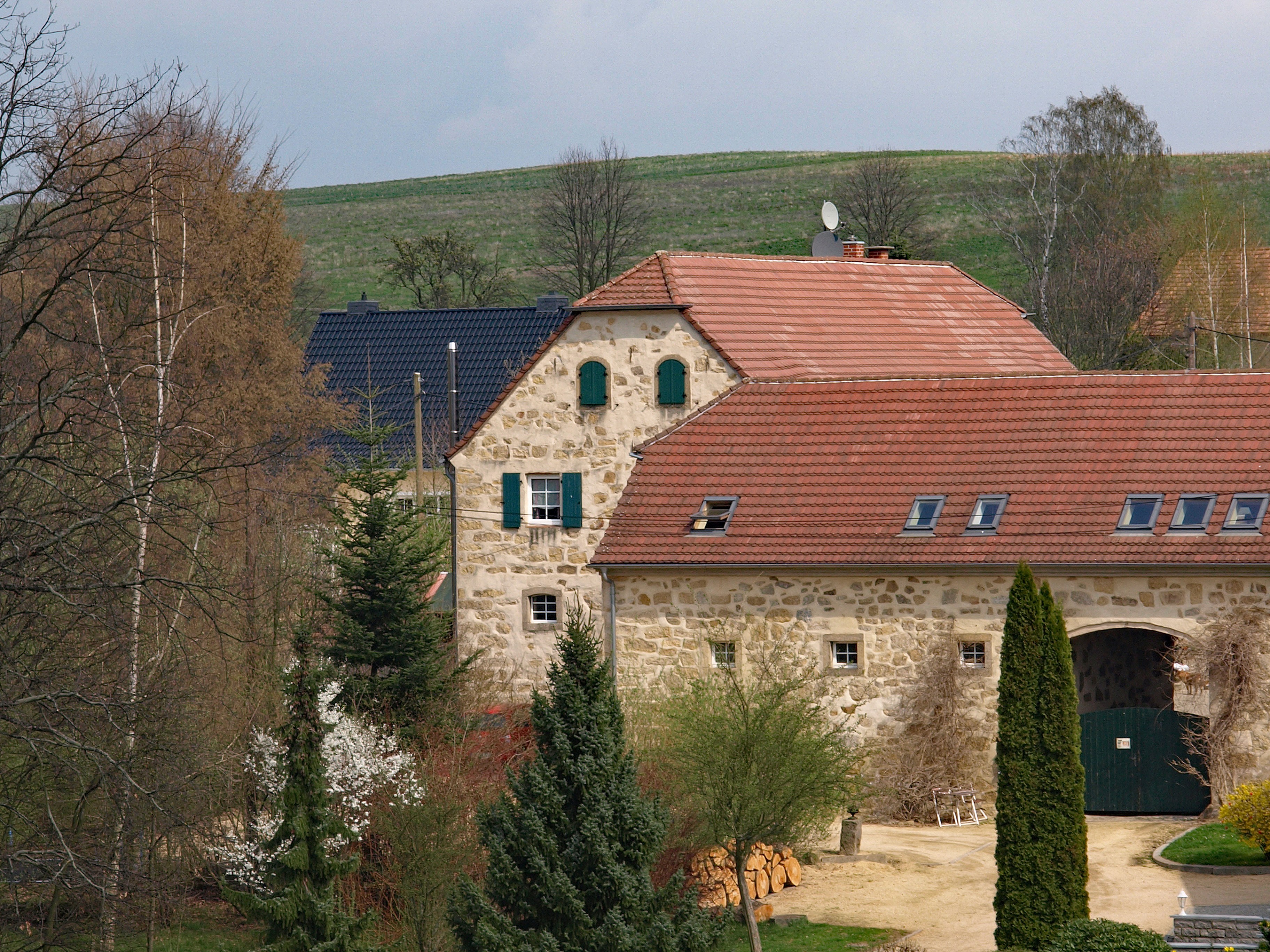 Teilansicht des denkmalgeschützten Dreiseithofes in Arnsdorf (Vierkirchen), Nr. 172